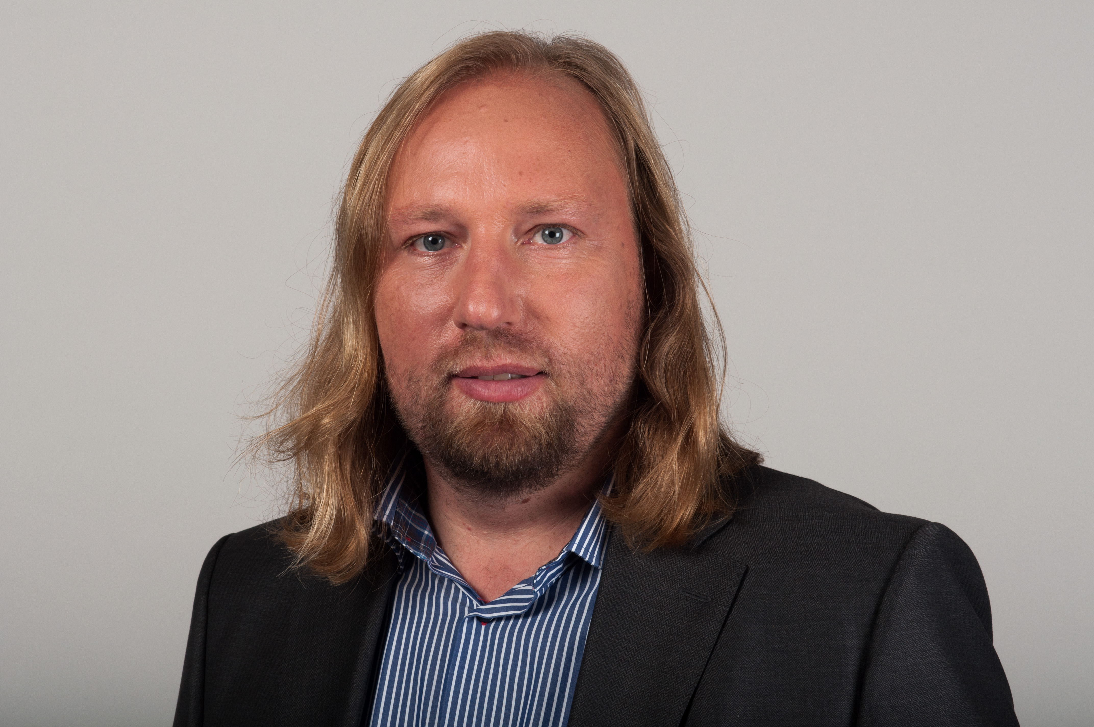 Anton Hofreiter (Bündnis 90/Die Grünen), MdB